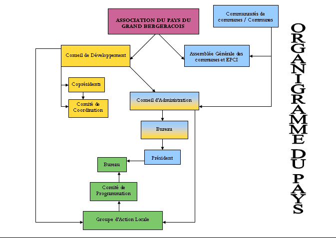 Organigramme du Pays du Grand bergeracois